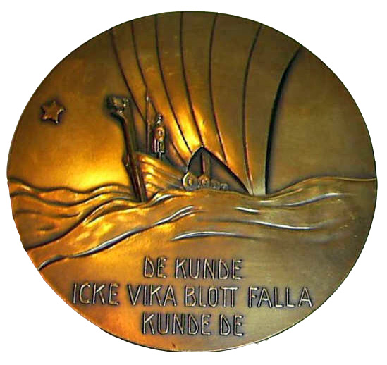 Medaljes uitgereik aan lede van die Skandinawiese korps.